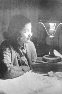 Портрет Валентины Гргонзайд, жены Е. Петрова.